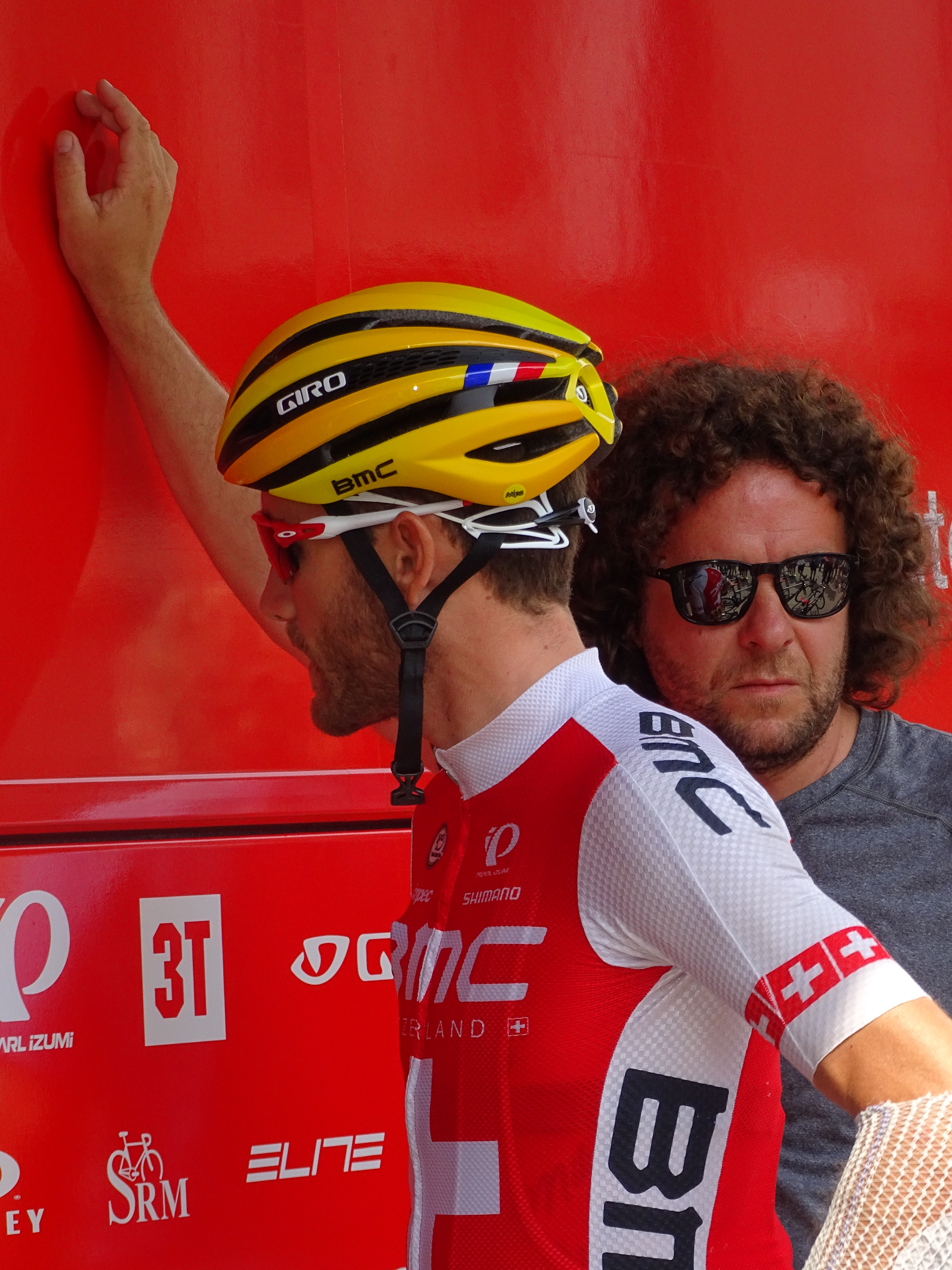 Reportage réalisé le lundi 6 juillet à l'occasion du départ de la troisième étape du Tour de France 2015 à Anvers, Belgique.